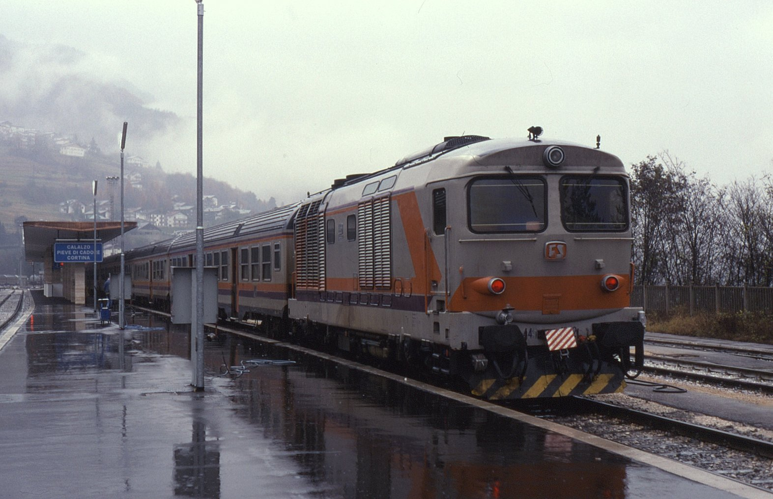 Locomotiva D.445.1042 delle Ferrovie dello Stato in sosta a Calalzo